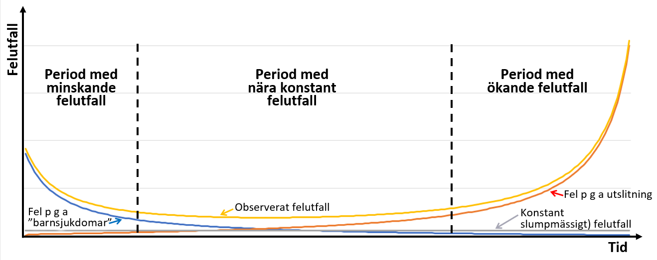 Badkarskurva med svensk text. Ser mer ut som felutfall för normala industriprodukter än bilden från U.S. arme. (Jag gjorde bilden eftersom jag retat mig på U.S.-armebildens bristande övensstämmelse med den verklighet jag har erfarenhet av.)